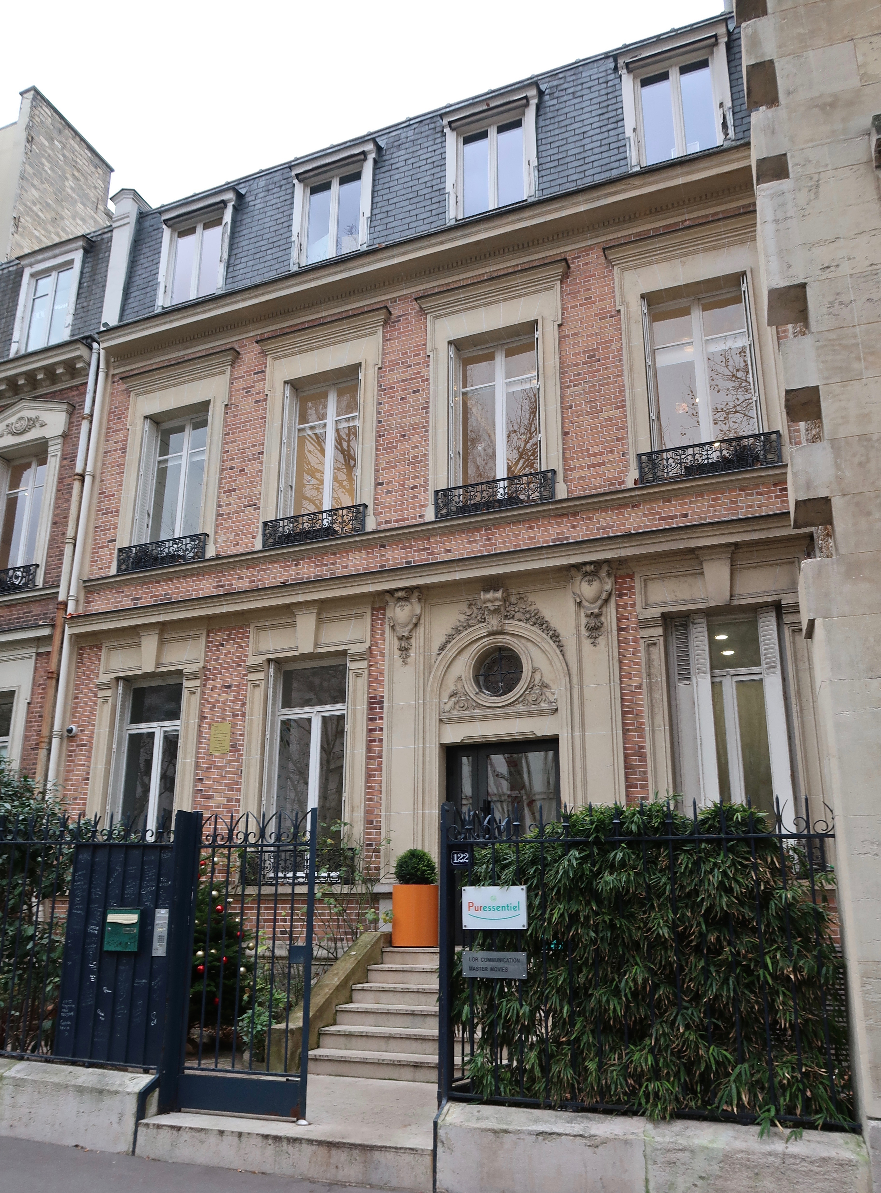 Ancienne société Label Flèche (du chanteur Claude François), 122 boulevard Exelmans (Paris, 16e).